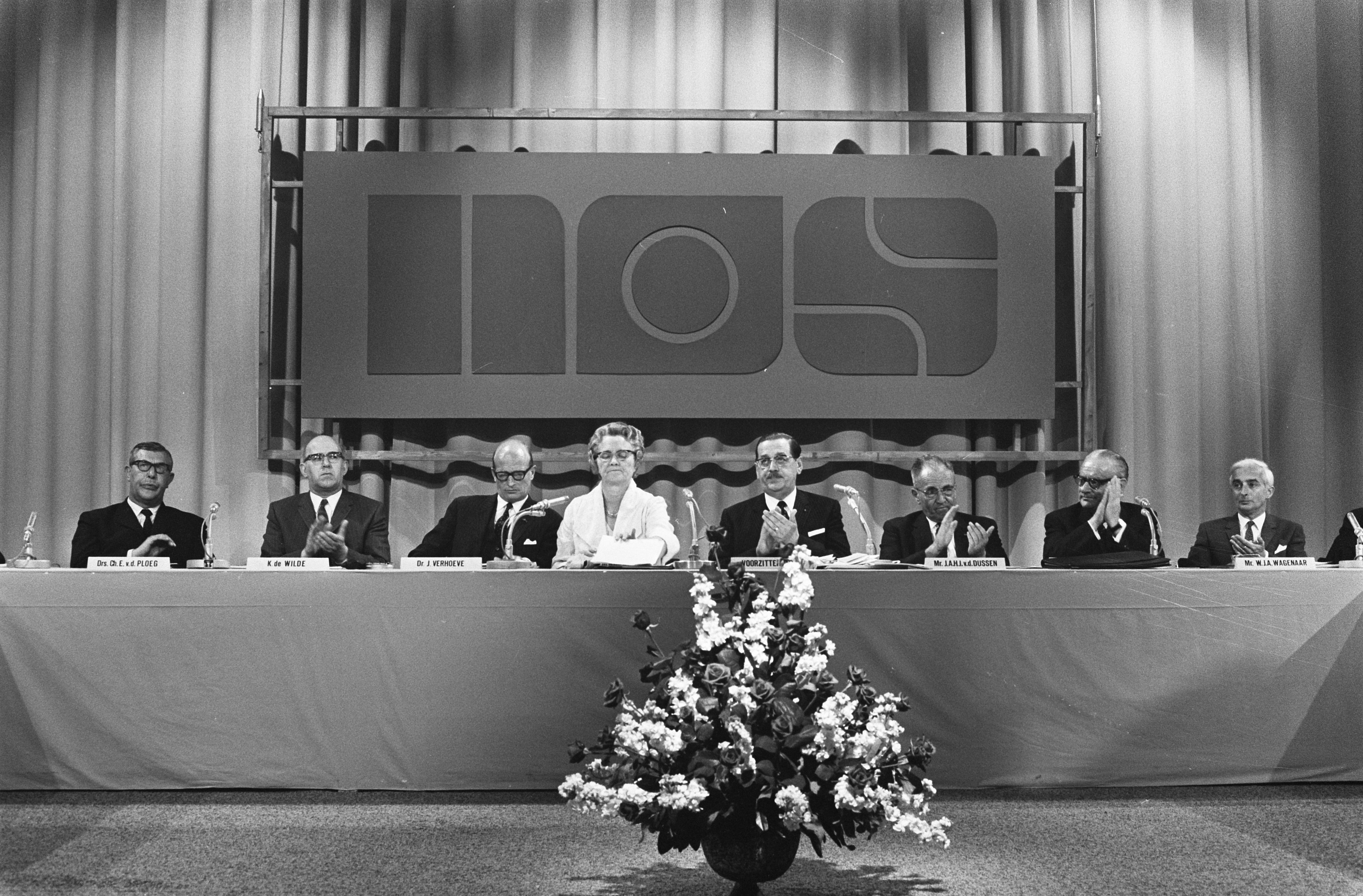 Collectie / Archief : Fotocollectie Anefo Reportage / Serie : [ onbekend ] Beschrijving : Minister Klompe installeert bestuur van Nederlandse Omroep Stichting, Hilversum het bestuur achter de tafel Datum : 29 mei 1969 Locatie : Hilversum Trefwoorden : installaties, ministers Persoonsnaam : Klompé, Marga Fotograaf : Verhoeff, Bert / Anefo Auteursrechthebbende : Nationaal Archief Materiaalsoort : Negatief (zwart/wit) Nummer archiefinventaris : bekijk toegang 2.24.01.05 Bestanddeelnummer : 922-4702